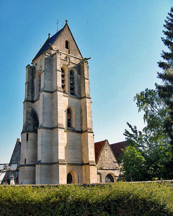 vue sur le clocher et la partie ouest